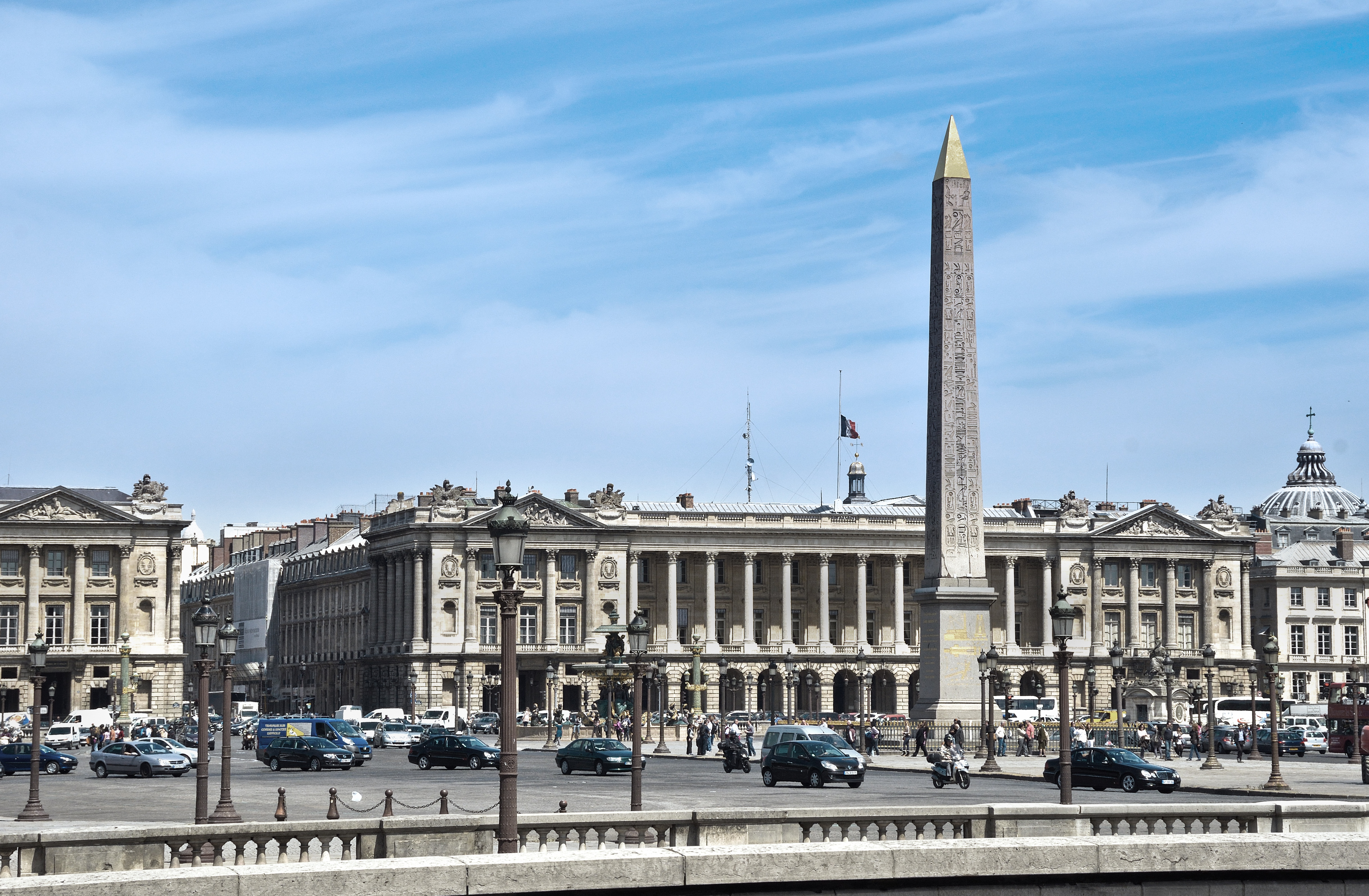 Place de la Concorde, Paris, France.